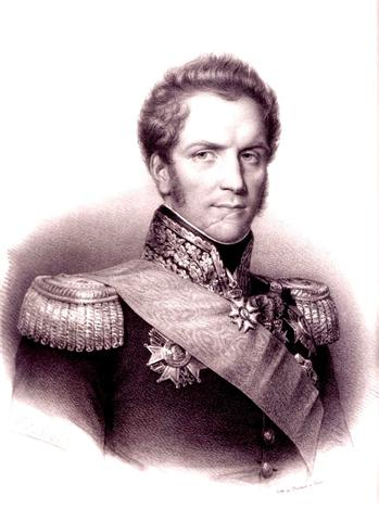 Portrait de Louis Sebastien Grundler